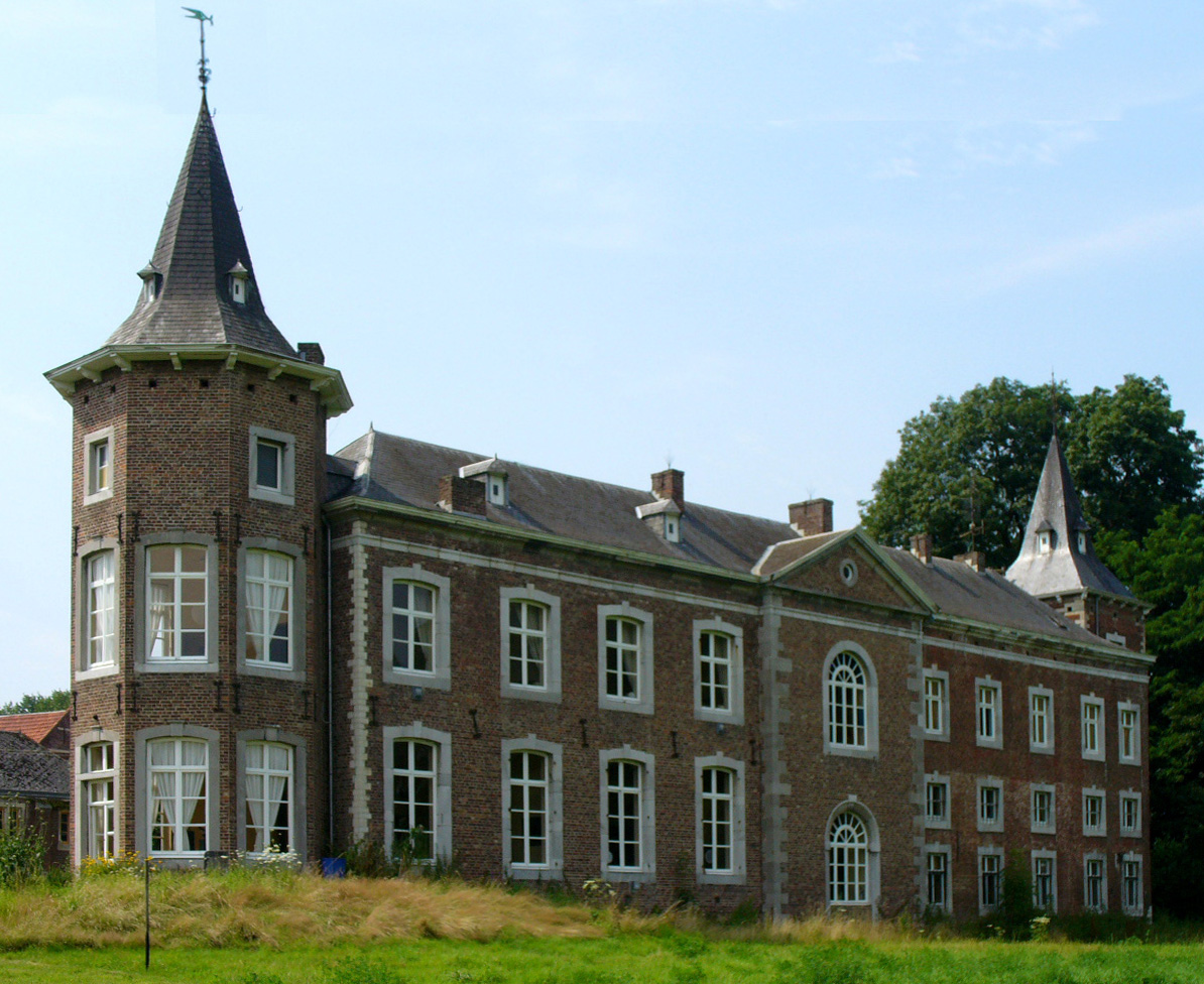 Oostelijke vleugel kasteel Nieuwenhoven (Sint-Truiden)